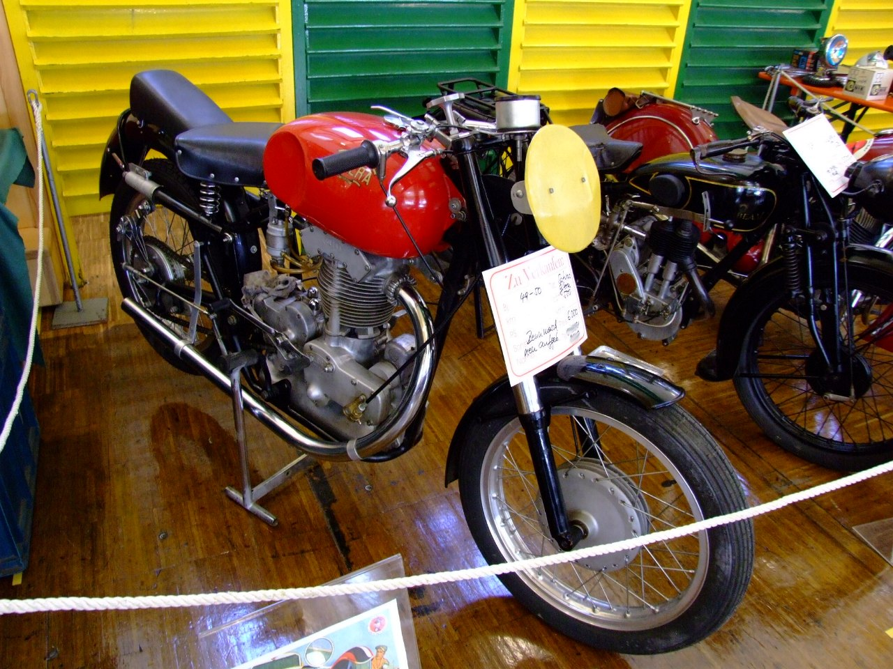 Gilera 500 Saturno Turismo del 1949 modificato con serbatoio e forcella anteriore del modello competizione 1951